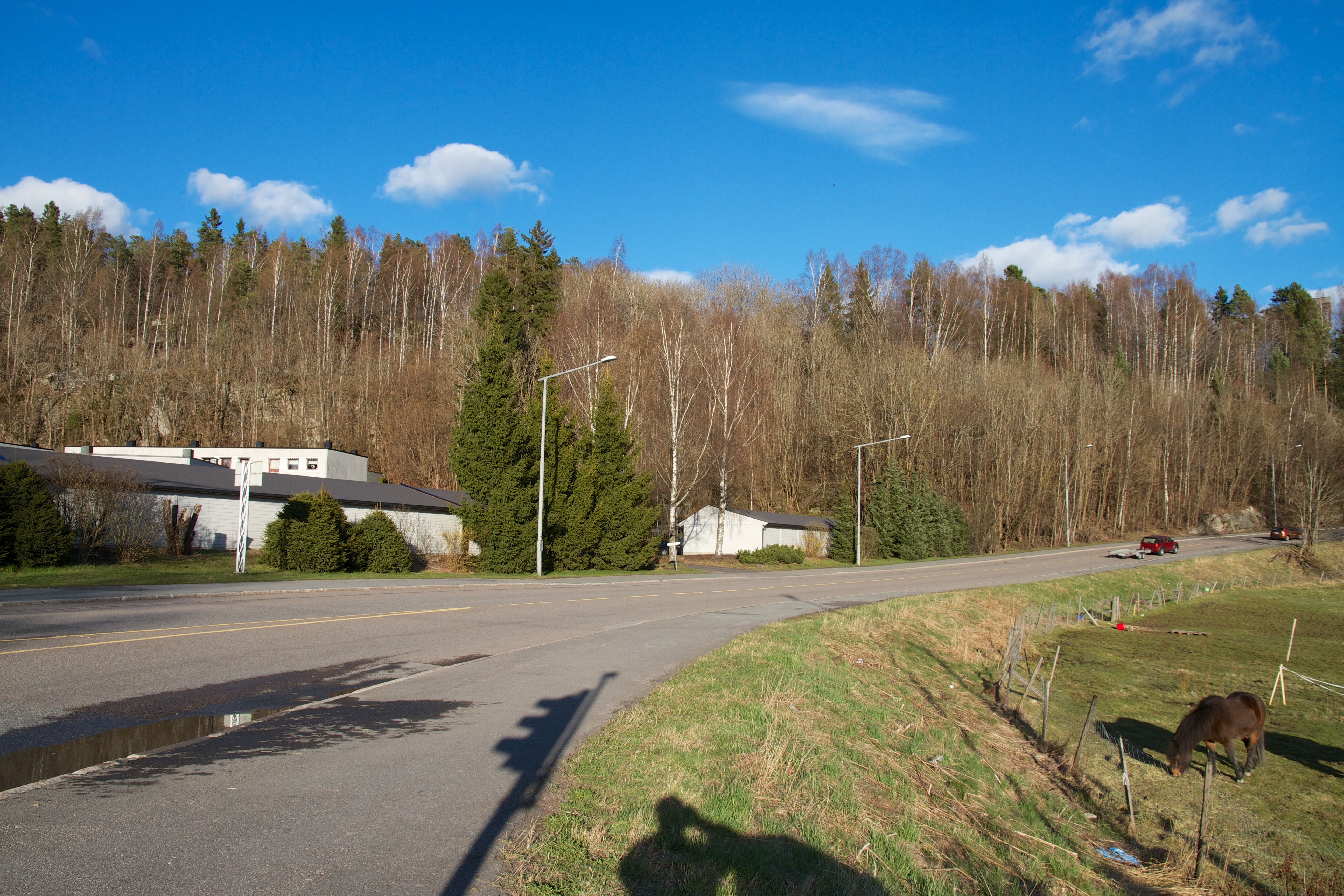 Eterveien i Bydel Østensjø i Oslo.